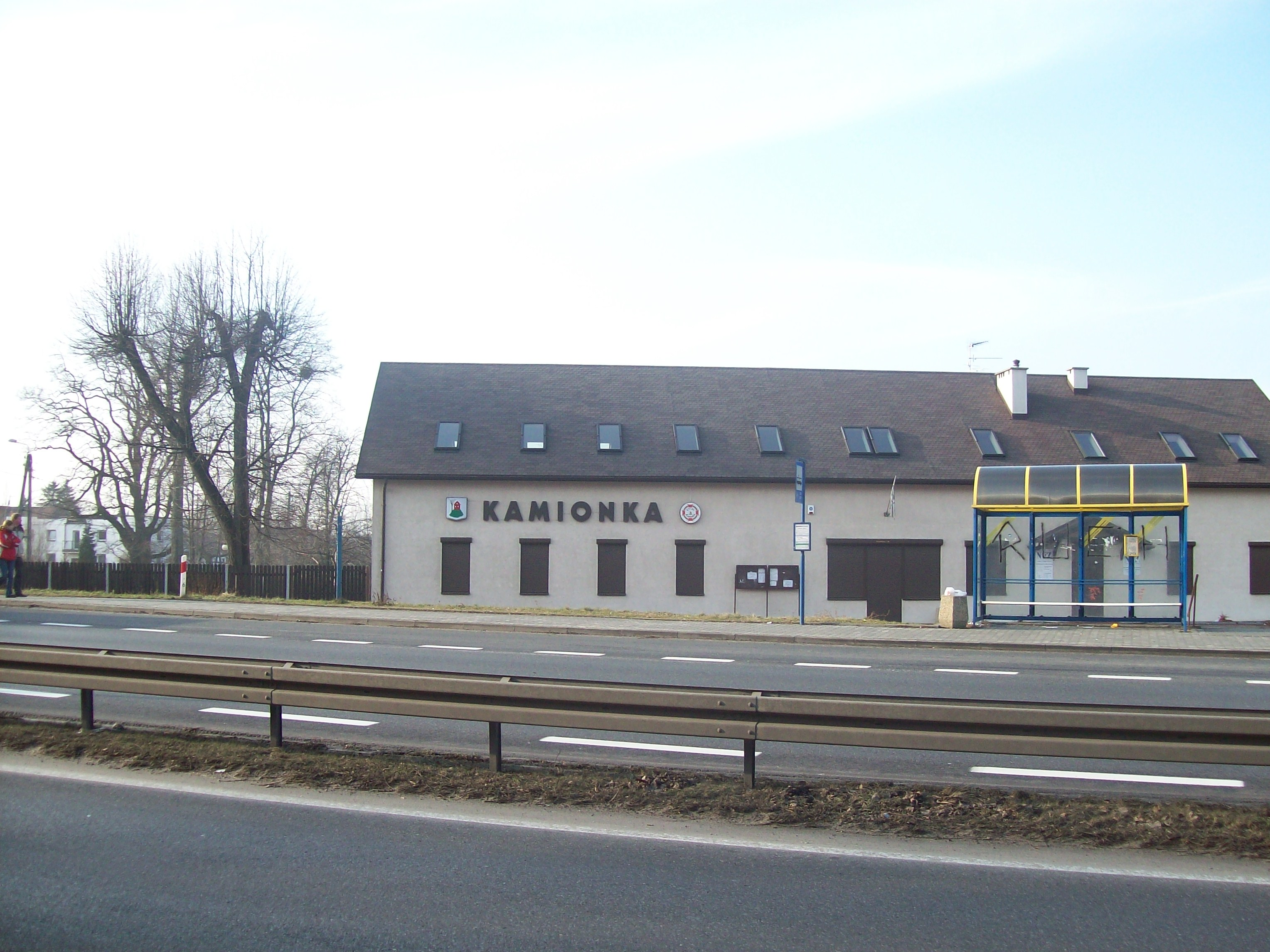 Budynek Straży Pożarnej w Mikołowie Kamionce